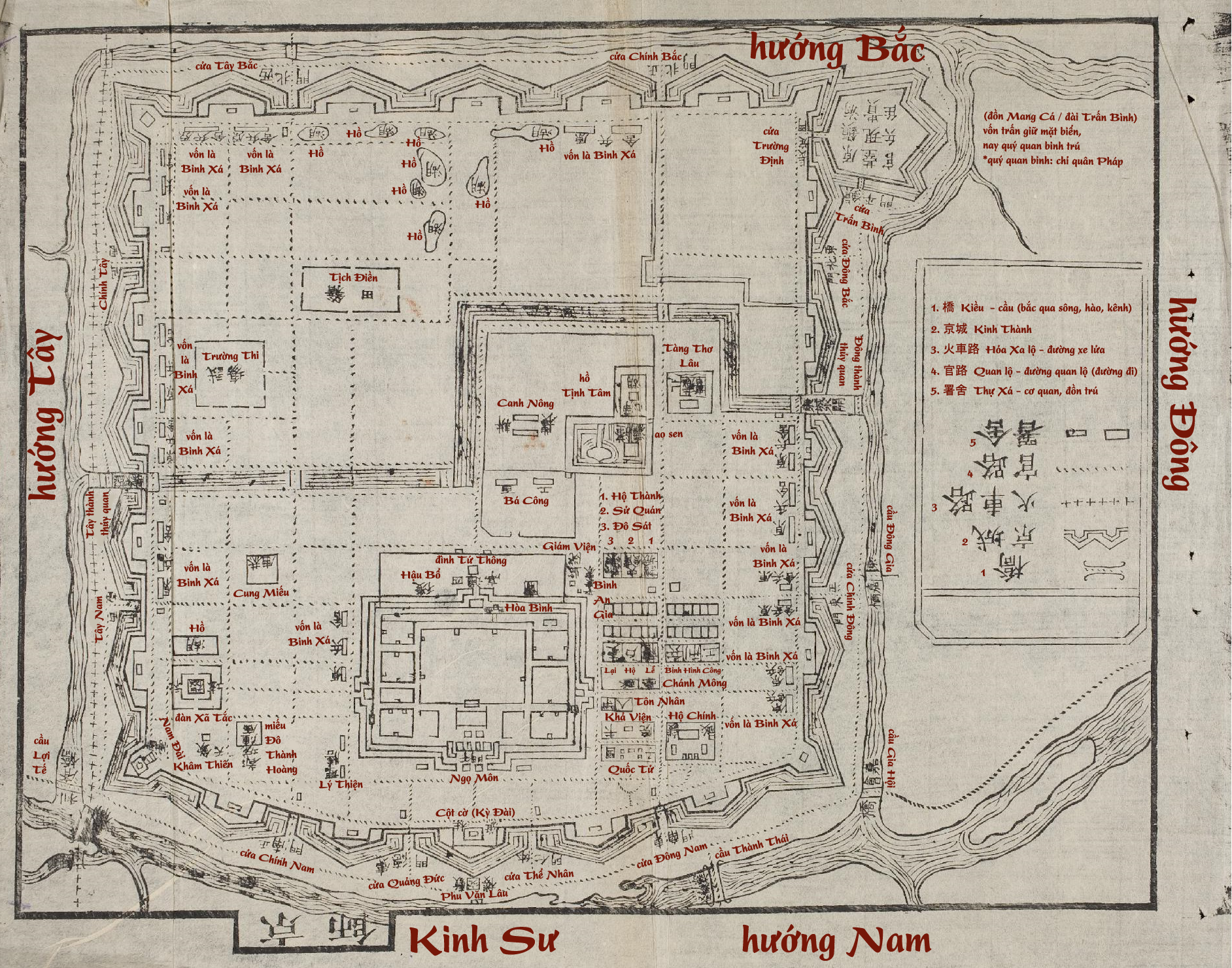 Kinh sư Huế - bản Việt hóa với hướng Bắc nằm bên trên như thông lệ dùng trong bản đồ. Bức bản đồ này nằm trong bộ bản đồ Đại Nam Nhất Thống Chí